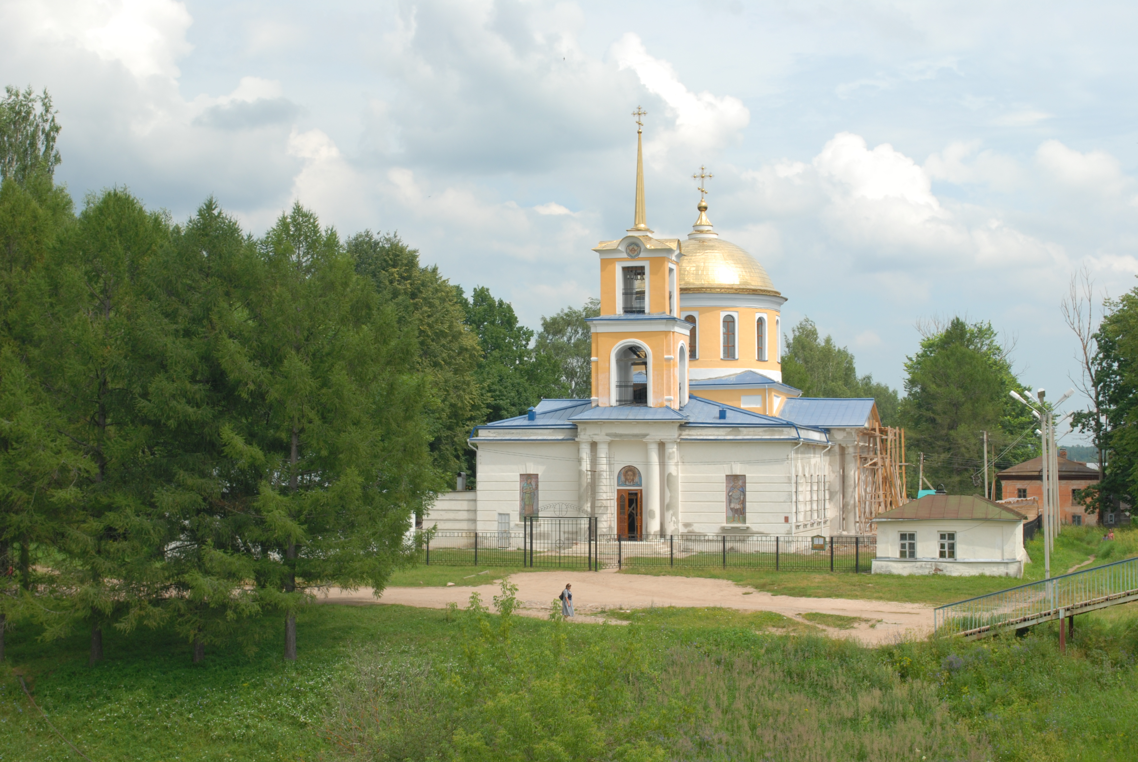 Собор Успенский (Тверская область, Зубцов, центр города, берег р. Волга)